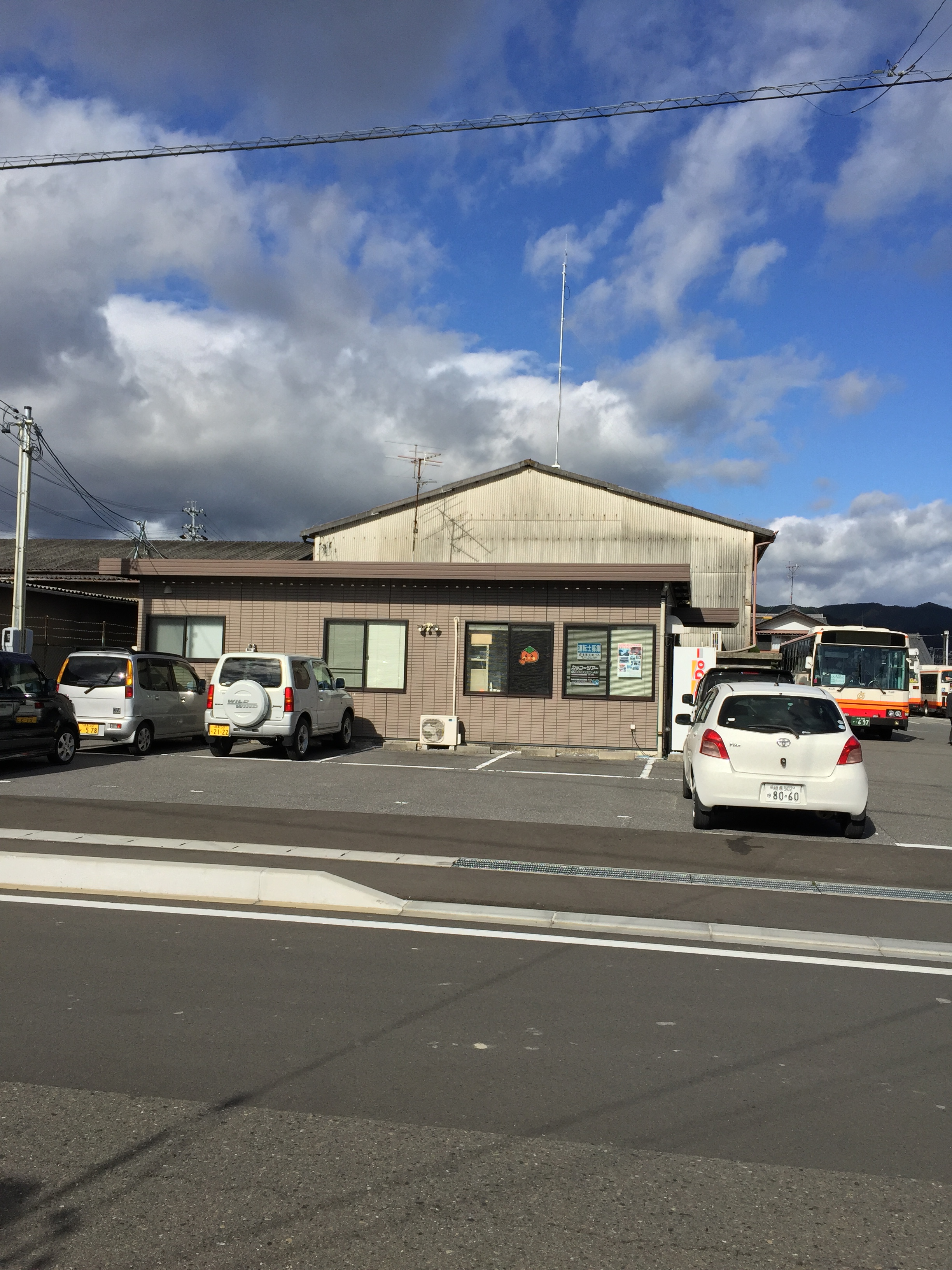 岐阜県揖斐郡揖斐川町が運行する揖斐川町コミニティバスを担当する名阪近鉄バスの営業所